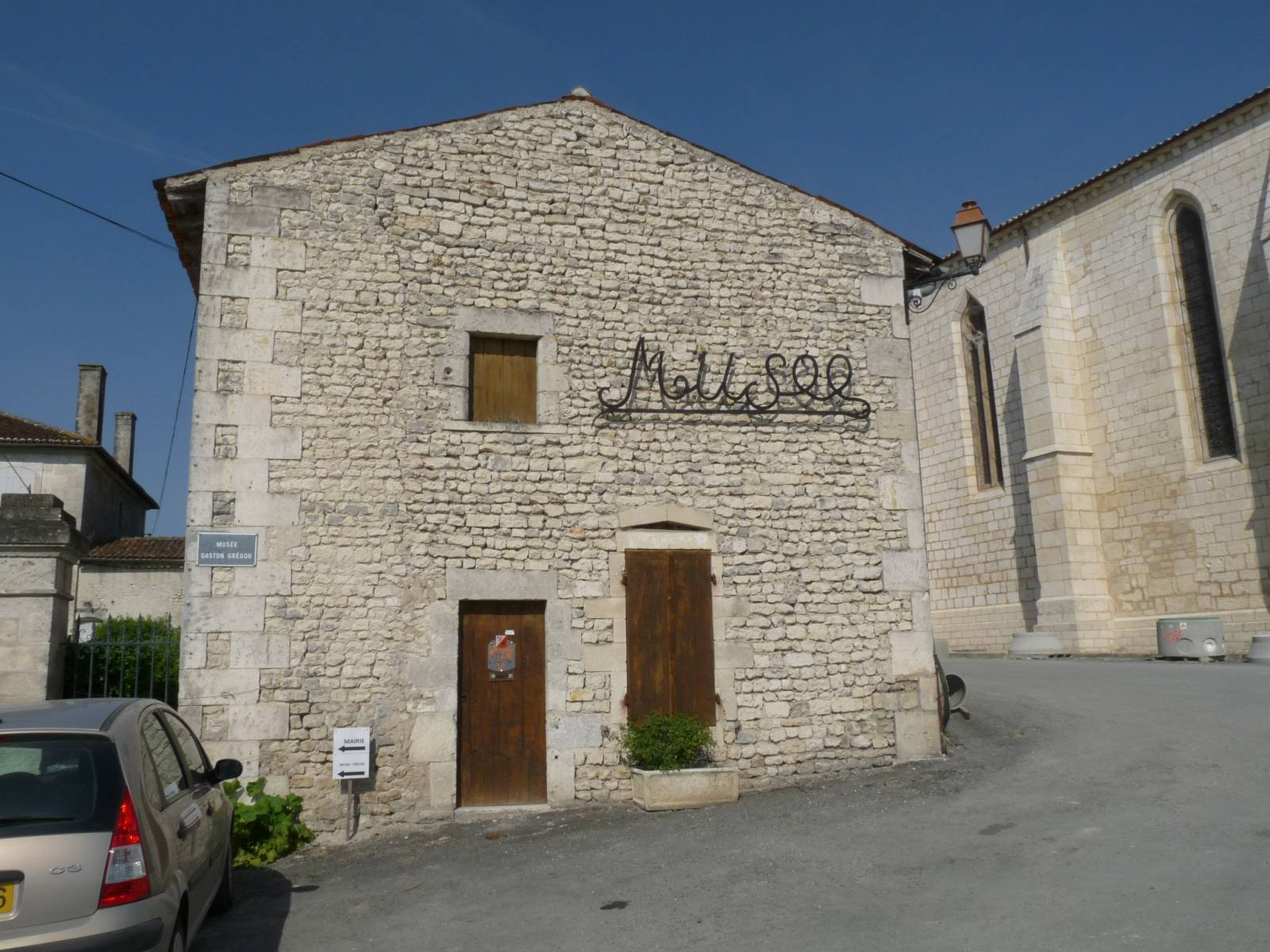 Musée local de Salles-d'Angles, Charente, France